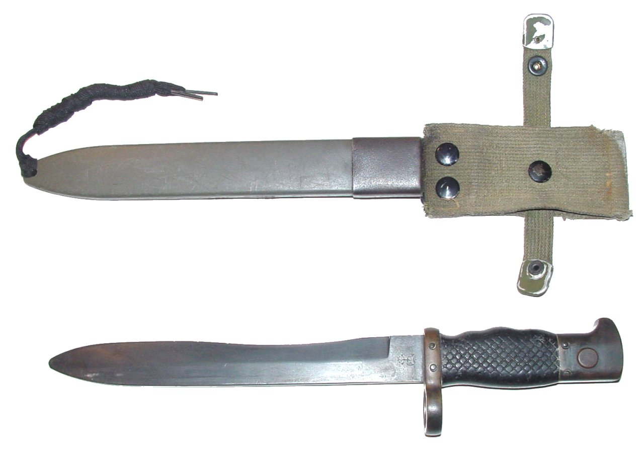 Bajonett FR 8 mit Scheide